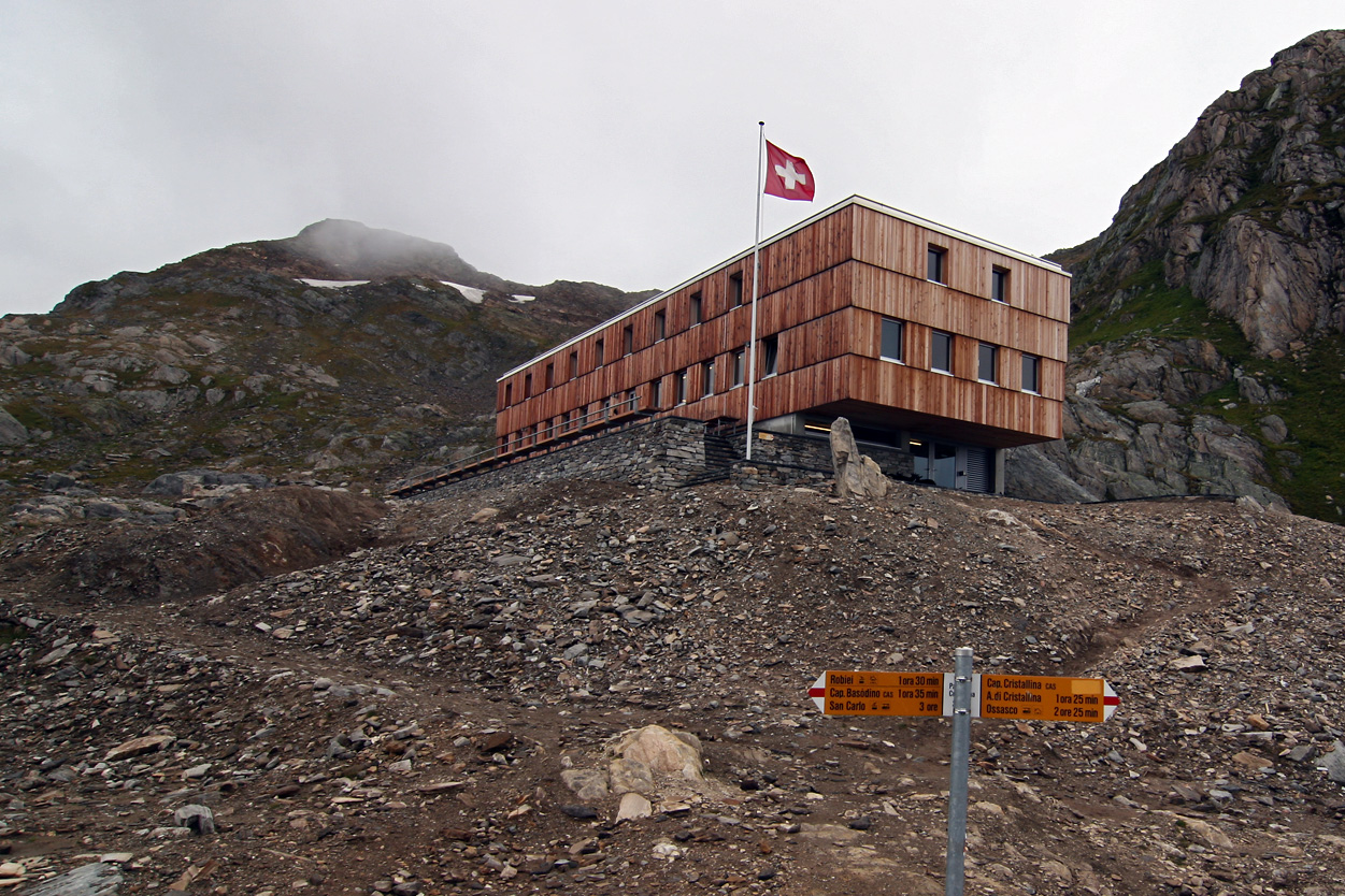 Die Cristallinahütte (Capanna Cristallina) im Tessin besticht nicht nur durch ihre Architektur. Auch im Inneren hat sie eher den Charakter einer Jugendherberge. Komfortable 4er Zimmer laden zur ruhigen Nacht ein.